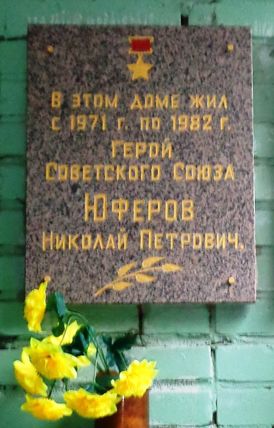 Мемориальная доска на доме в поселке Монино Московской области, где проживал Герой Советского Союза